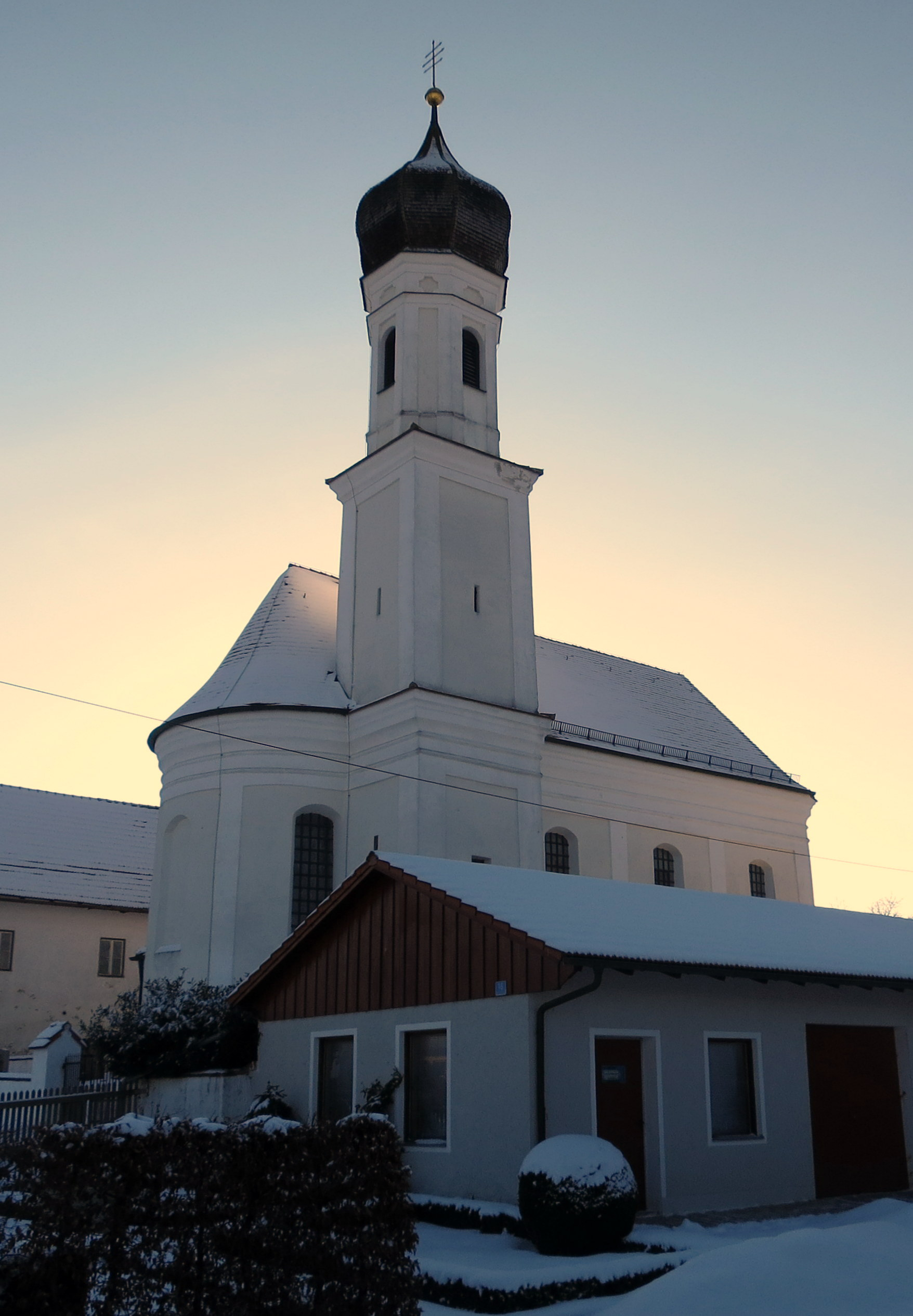 Filialkirche St. Leonhard mit ihrer Ausstattung